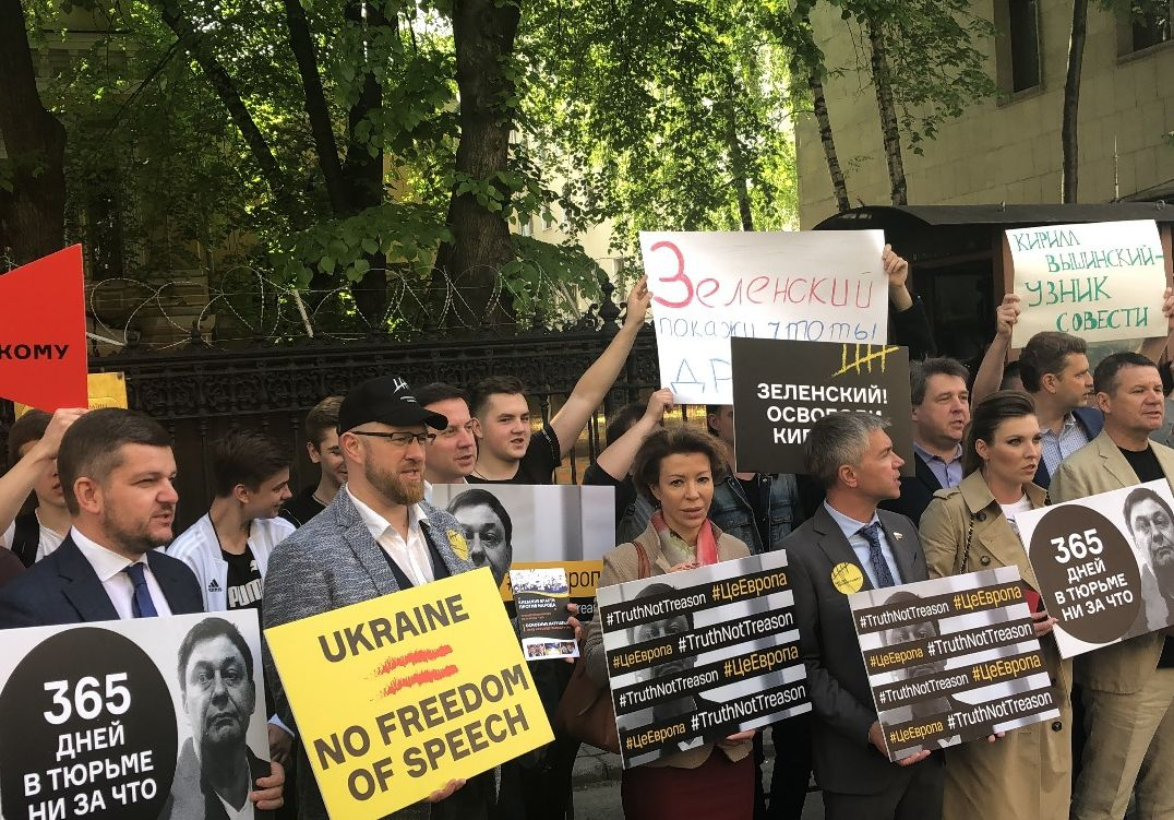 «Волю Кириллу Вышинскому!»: в Москве прошла акция в поддержку руководителя портала РИА «Новости Украина».